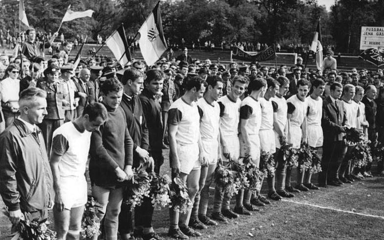 Zentralbild-Liebers Wen-Qu 25.5.1968 Jena: FC Carl Zeiss Jena neuer deutscher Fußballmeister der DDR. Blumen für den neuen Meister.